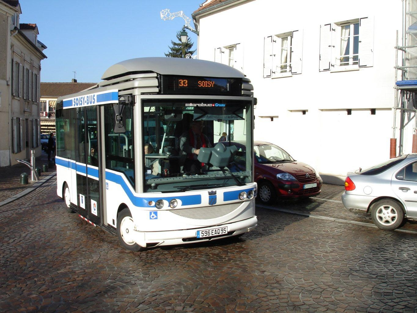 Le Soisybus - Soisy-sous-Montmorency (France)